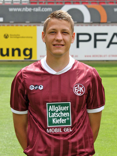 Ivo Ilicevic, Fußballspieler